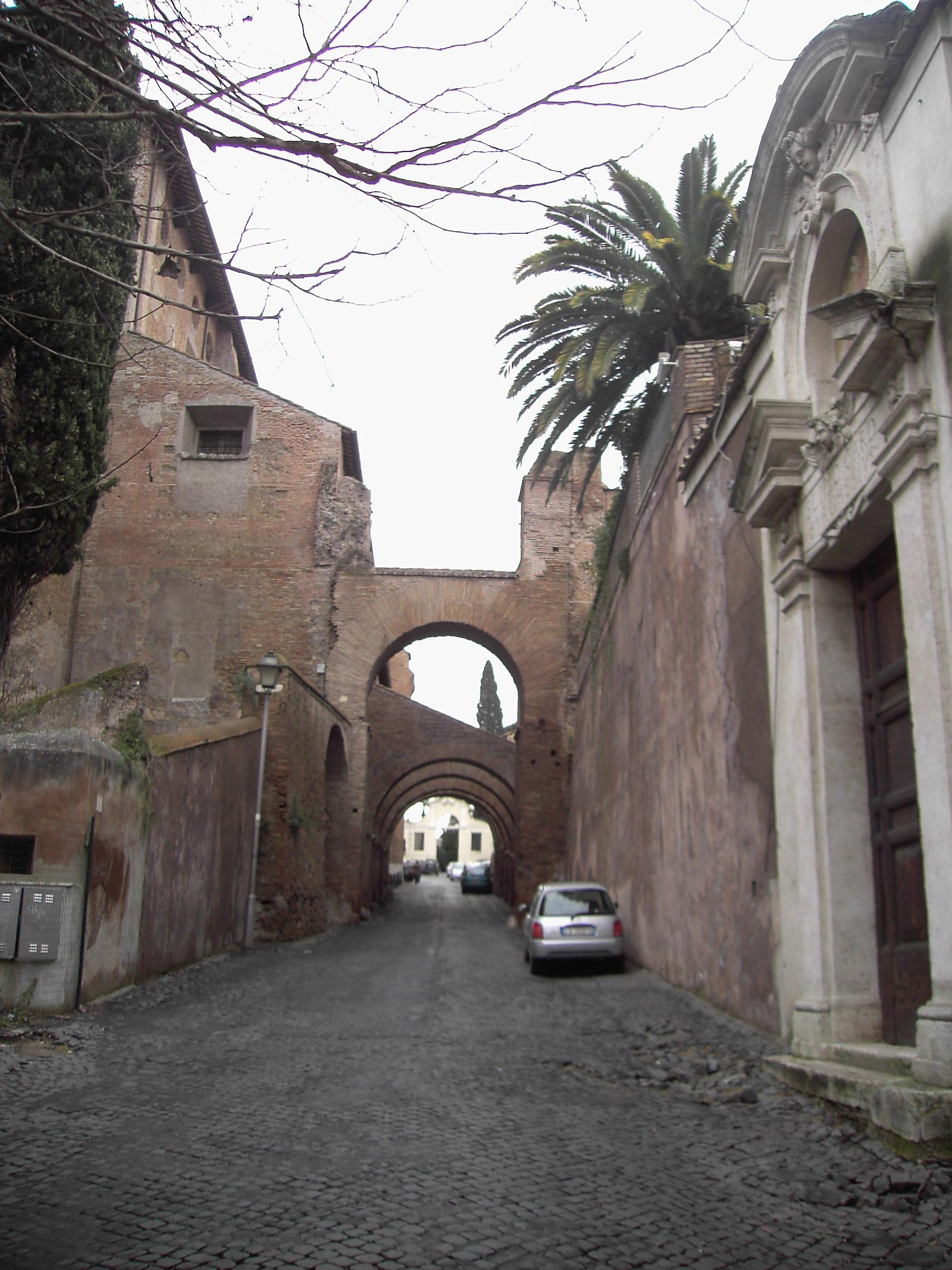 Roma, Clivo di Scauro al Celio: a sinistra la Basilica dei santi Giovanni e Paolo al Celio, a destra le mura della Biblioteca di Agapito (San Gregorio al Celio)